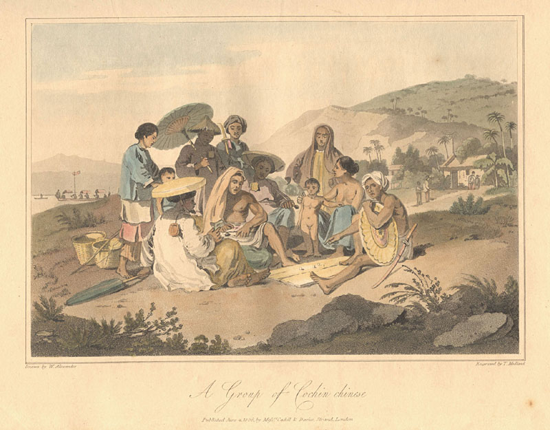 Một nhóm người Đàng Trong thời Tây Sơn (năm 1793)